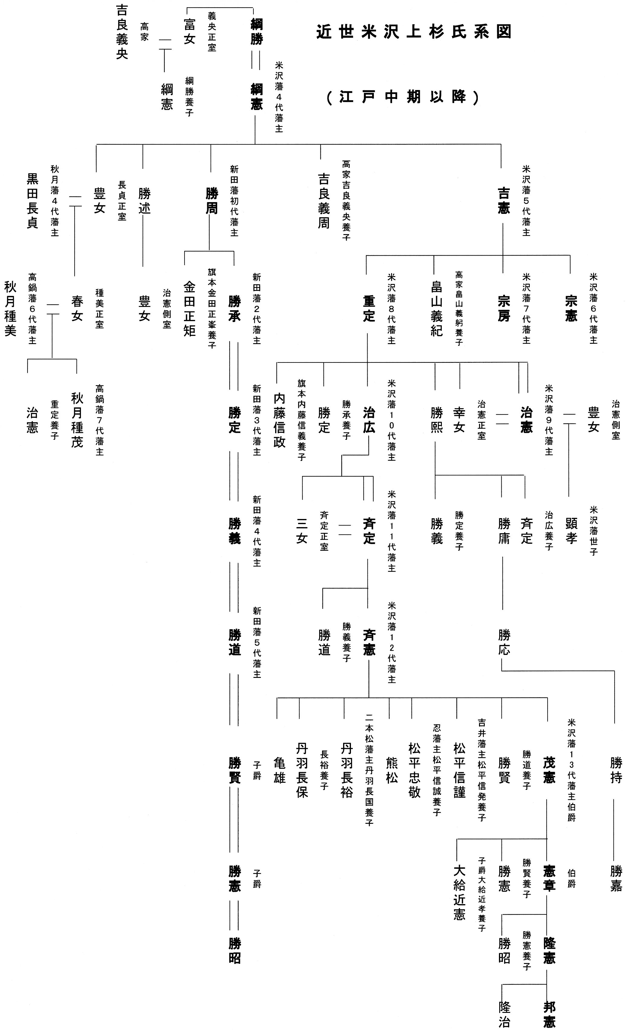 前版を一部訂正